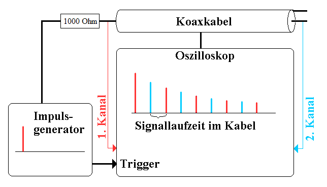 Impulse bei offenem Kabelende, Reflexion, Laufzeit